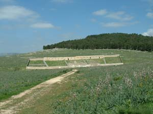 Autore: Mariano Fracchiolla Fonte: Descrizione: Jazzo Pantano (Agro di Gravina (BA) - Parco Nazionale dell'Alta Murgia) .